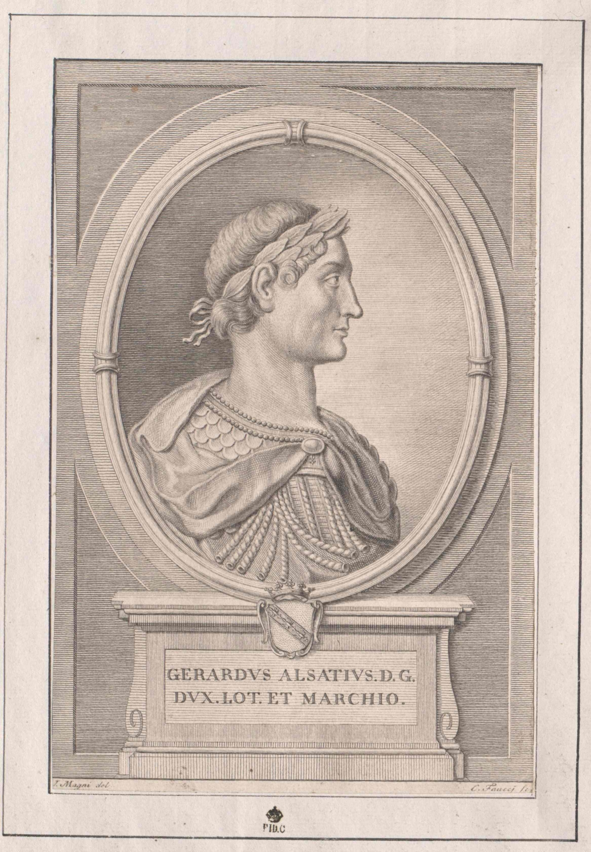 Portrait reprenant celui du Médaillier de Lorraine